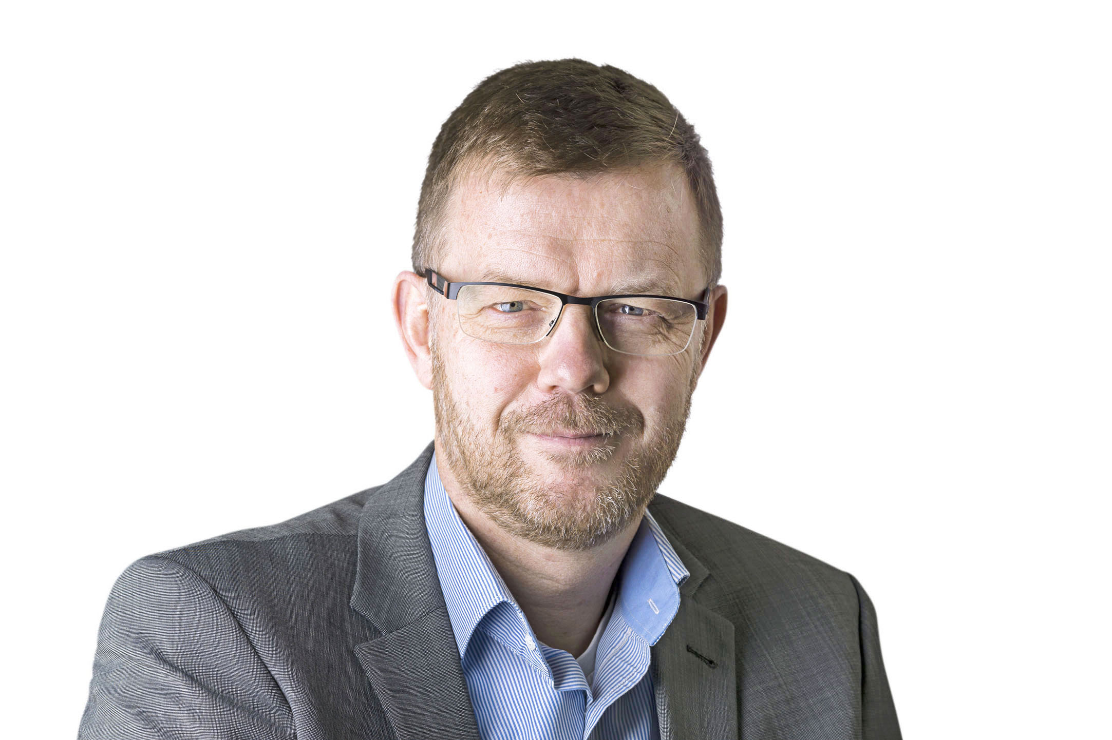 (Foto: Lars Salomonsen)